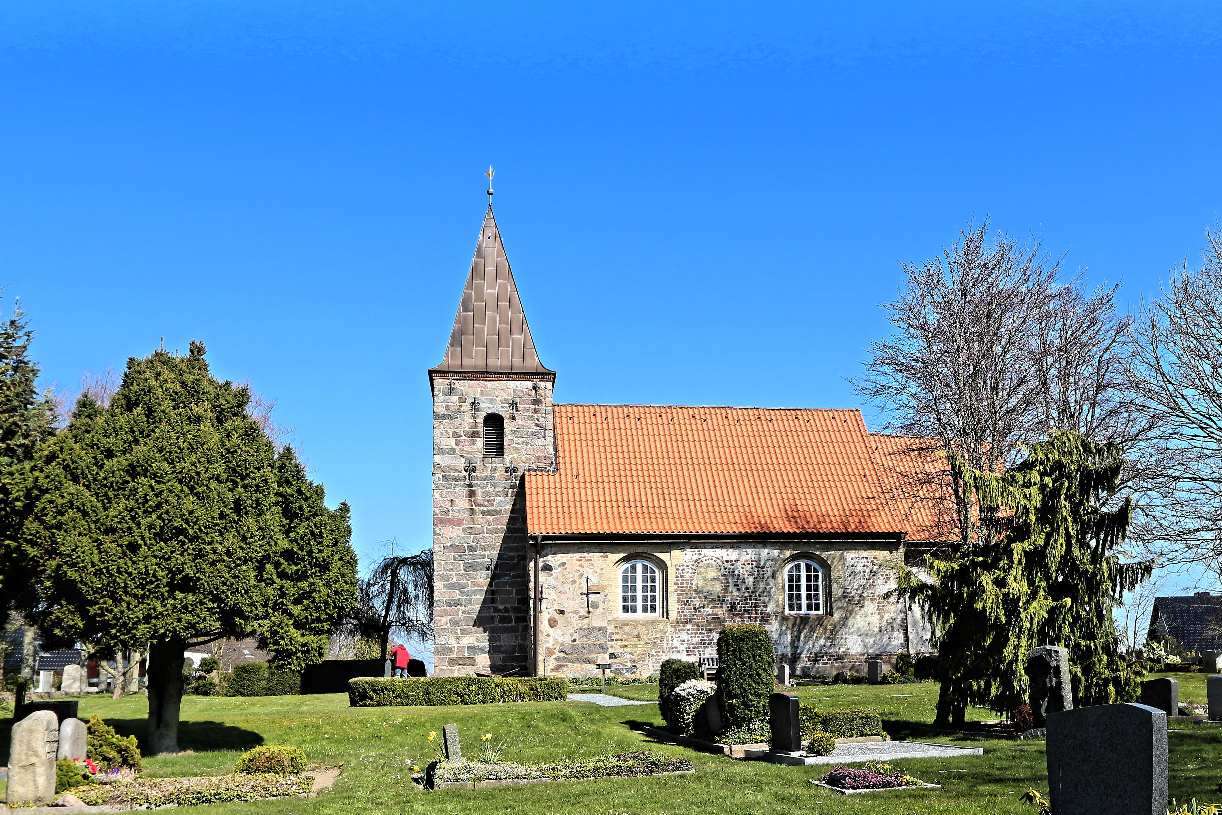 Maasbüll Rüllschau Kirchberg